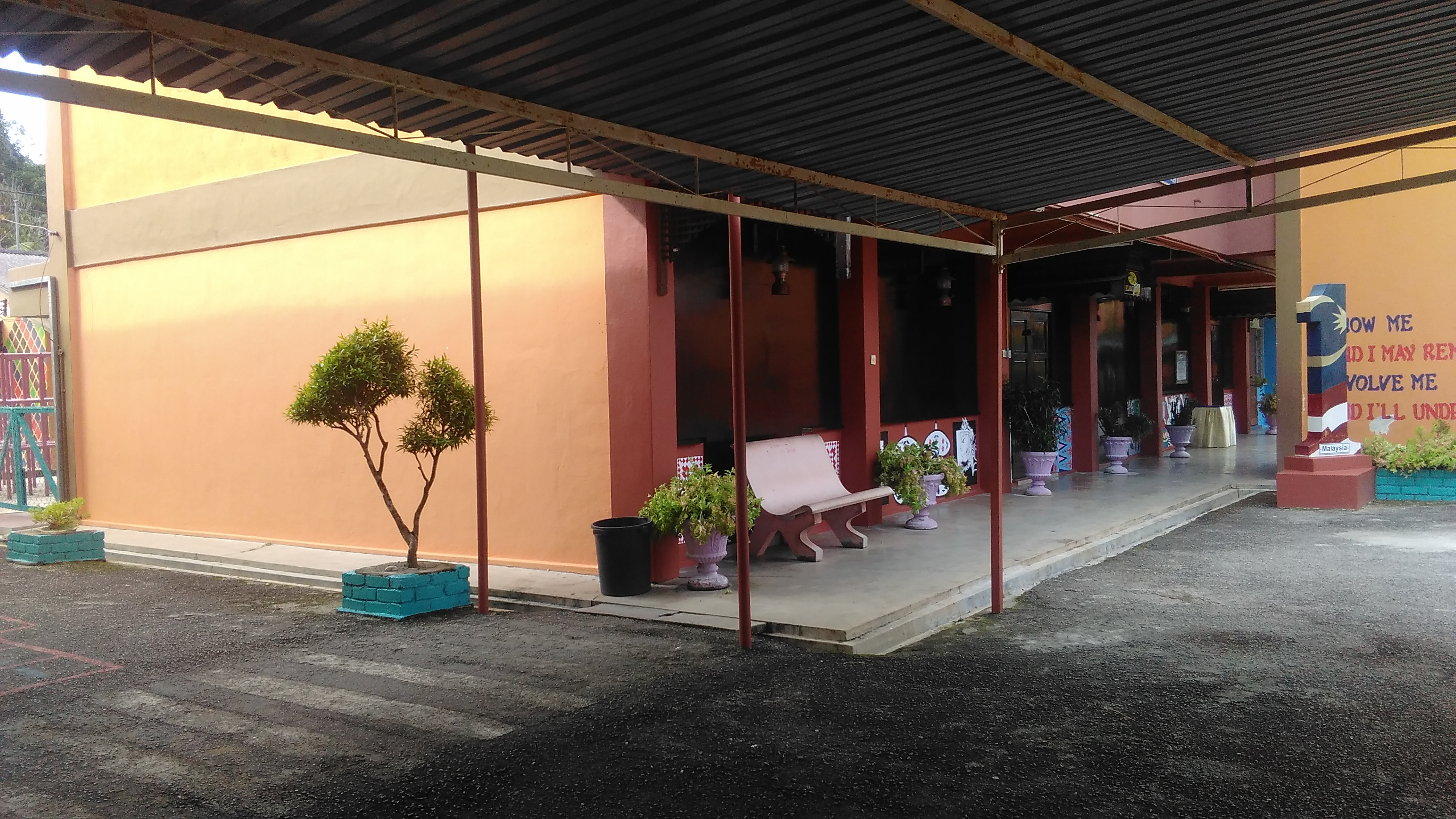 Pandangan Luar sisi